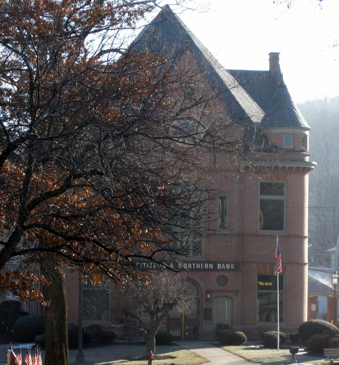 Troy, Pennsylvania